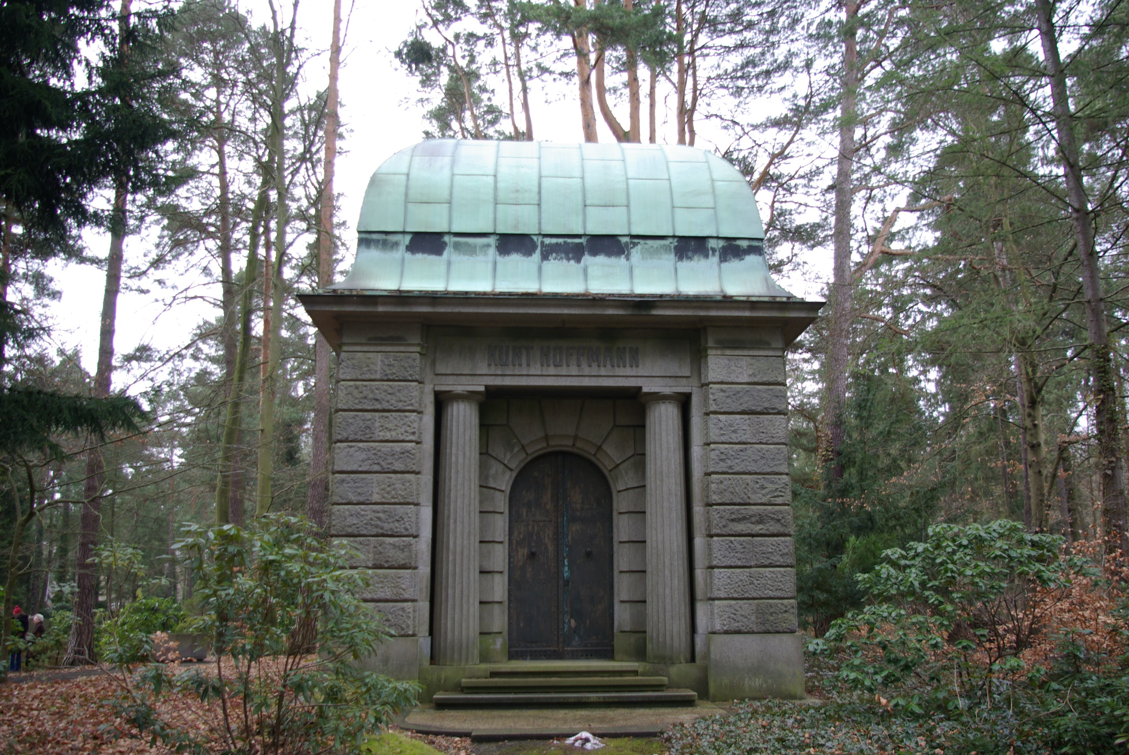 Stahnsdorf in Brandenburg. Auf dem Wilmersdorfer Waldfriedhof Güterfelde steht das Mausoleum für Kurt Hoffmann. Das Mausoleum steht unter Denkmalschutz.